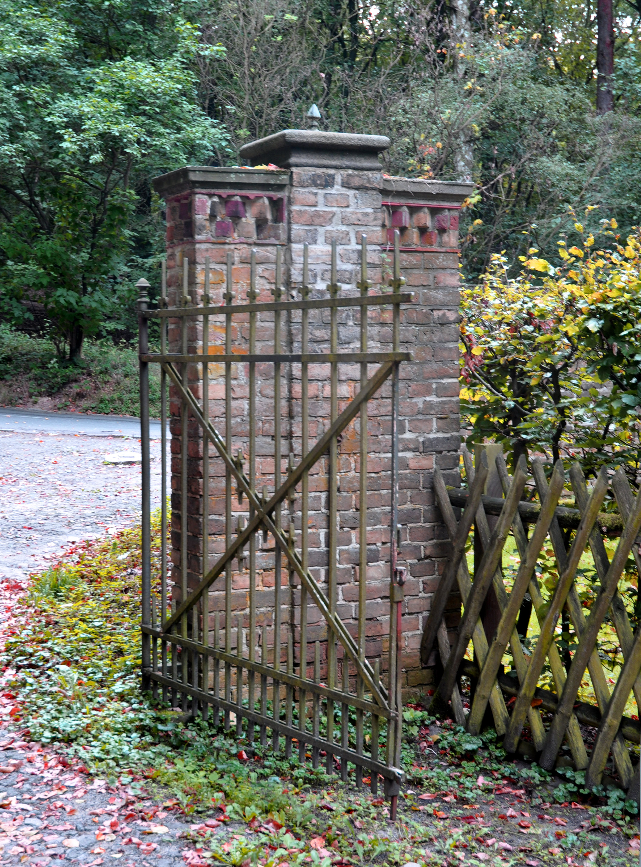 Torpfeiler am Wildparktor Klein-Glienicke